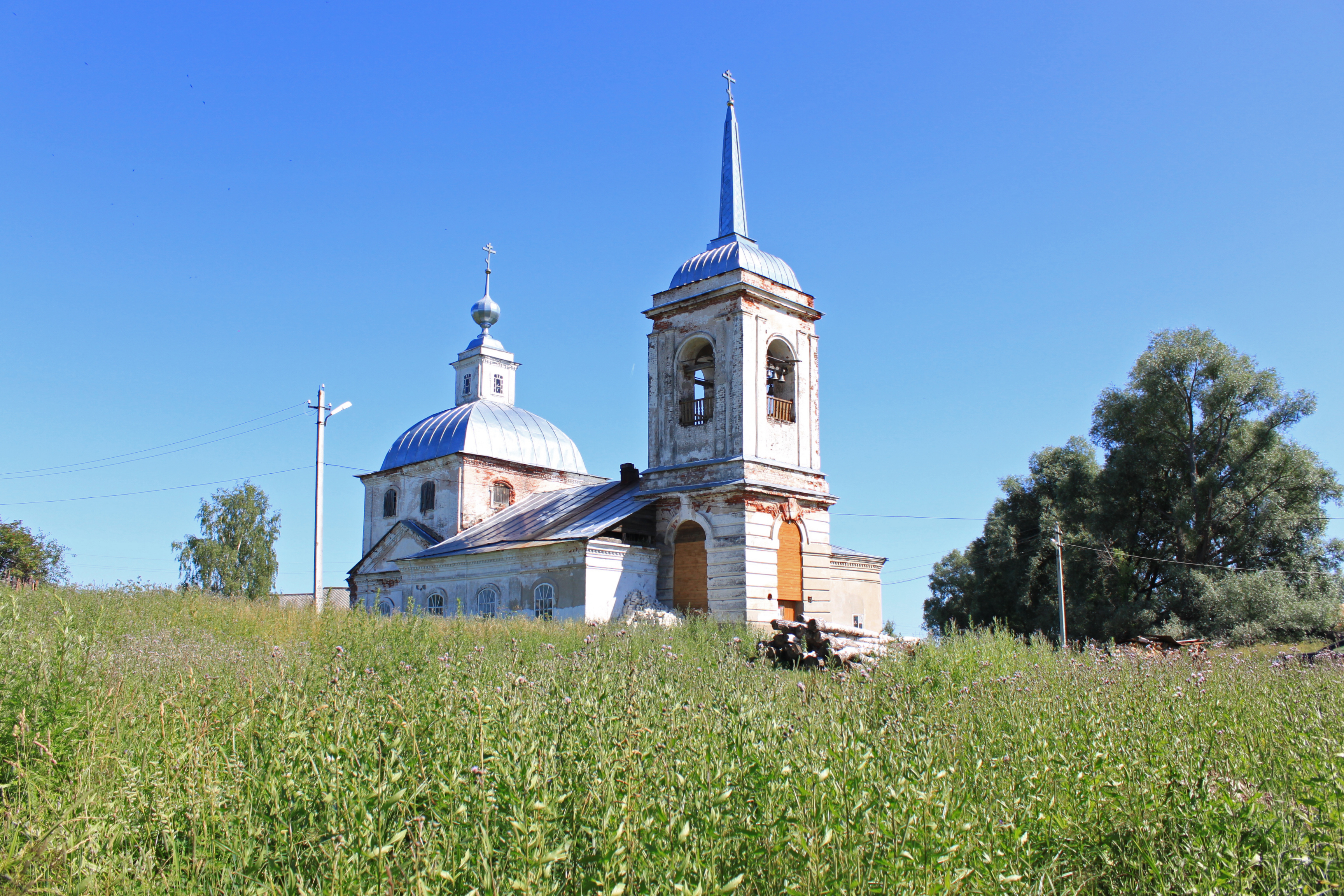 Церковь Рождественский Майдан Арзамасский район